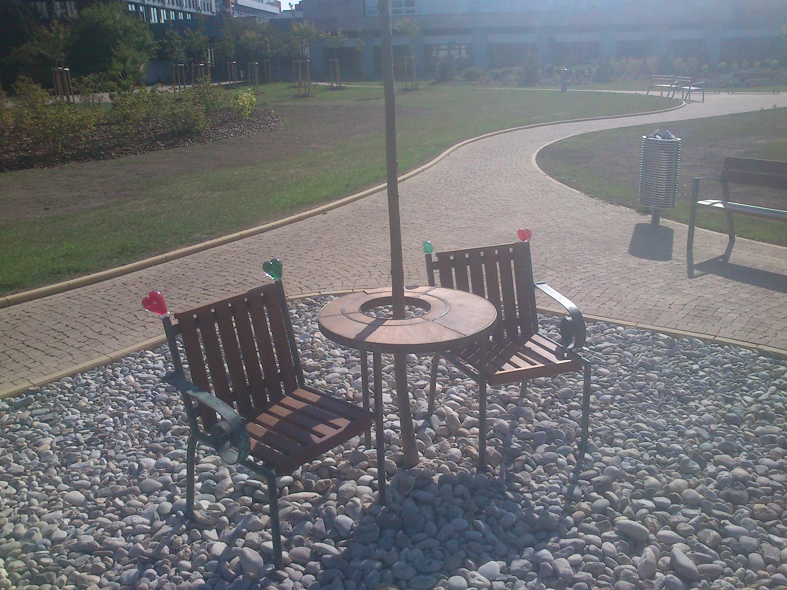 Lavička Václava Havla